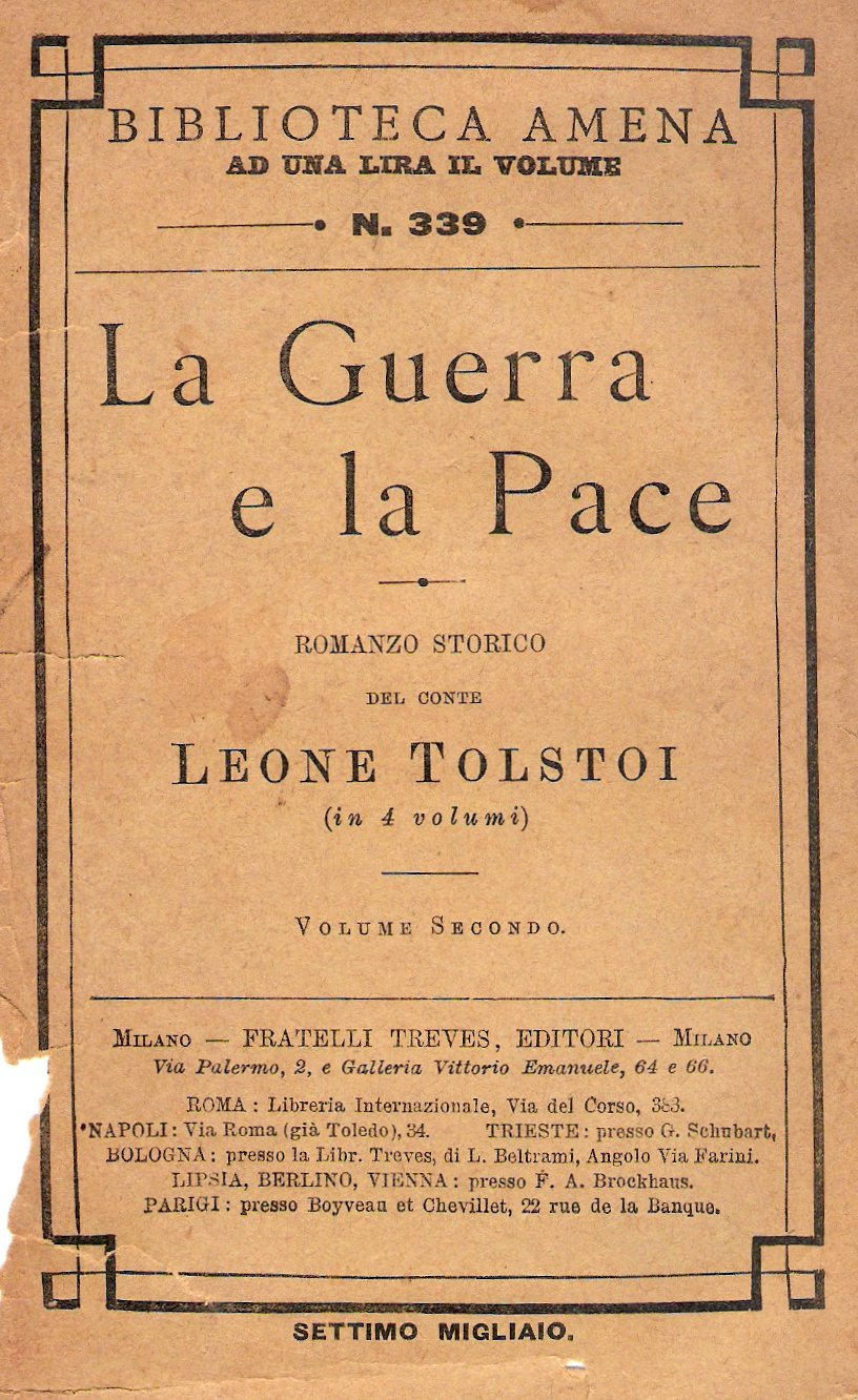 foto di vecchio libro